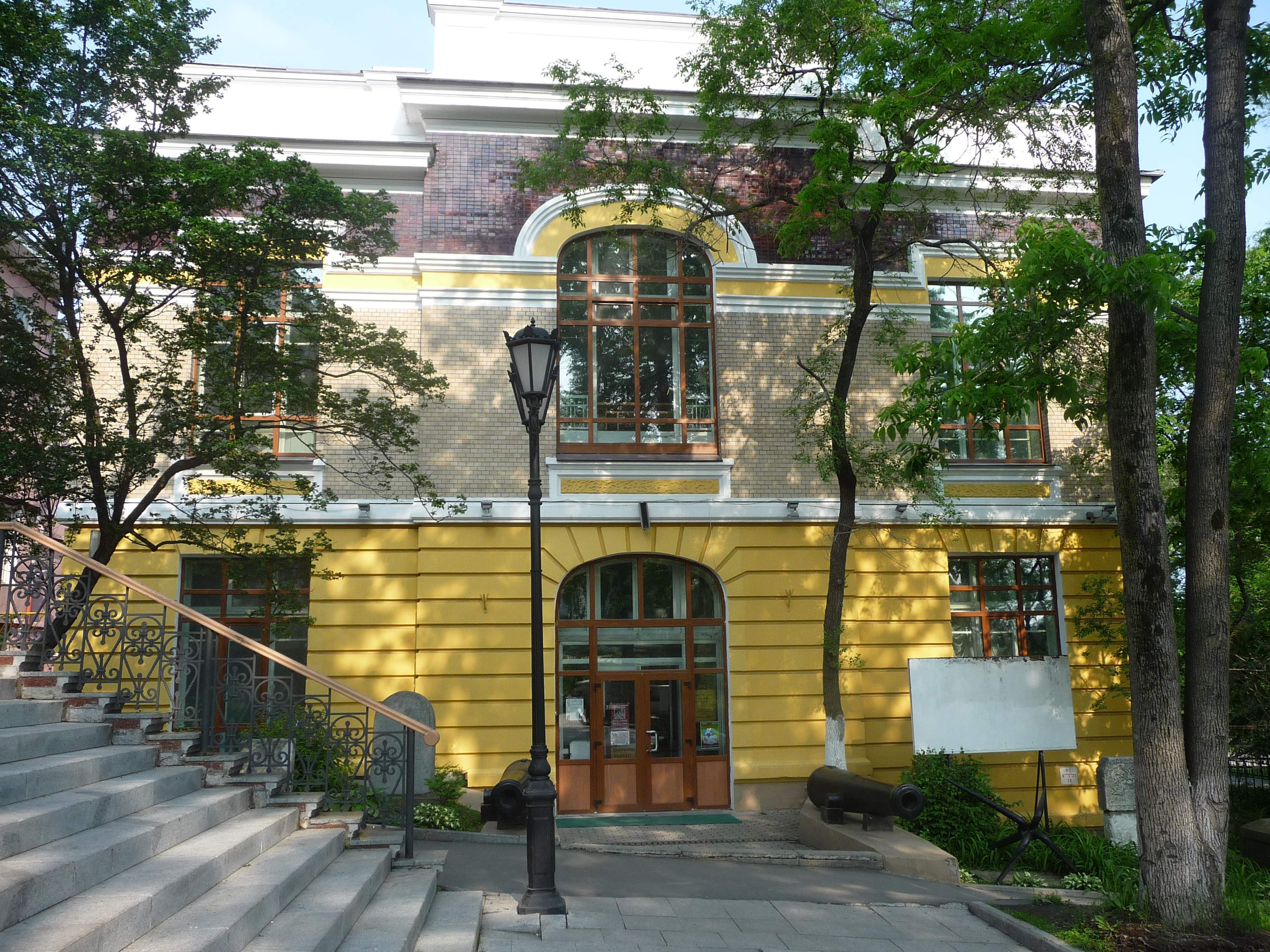 Бывшее здание музея Общества изучения Амурского края (ОИАК) во Владивостоке. Ныне — «Музей города» в составе музея им. В.К. Арсеньева, ул. Петра Великого, 6